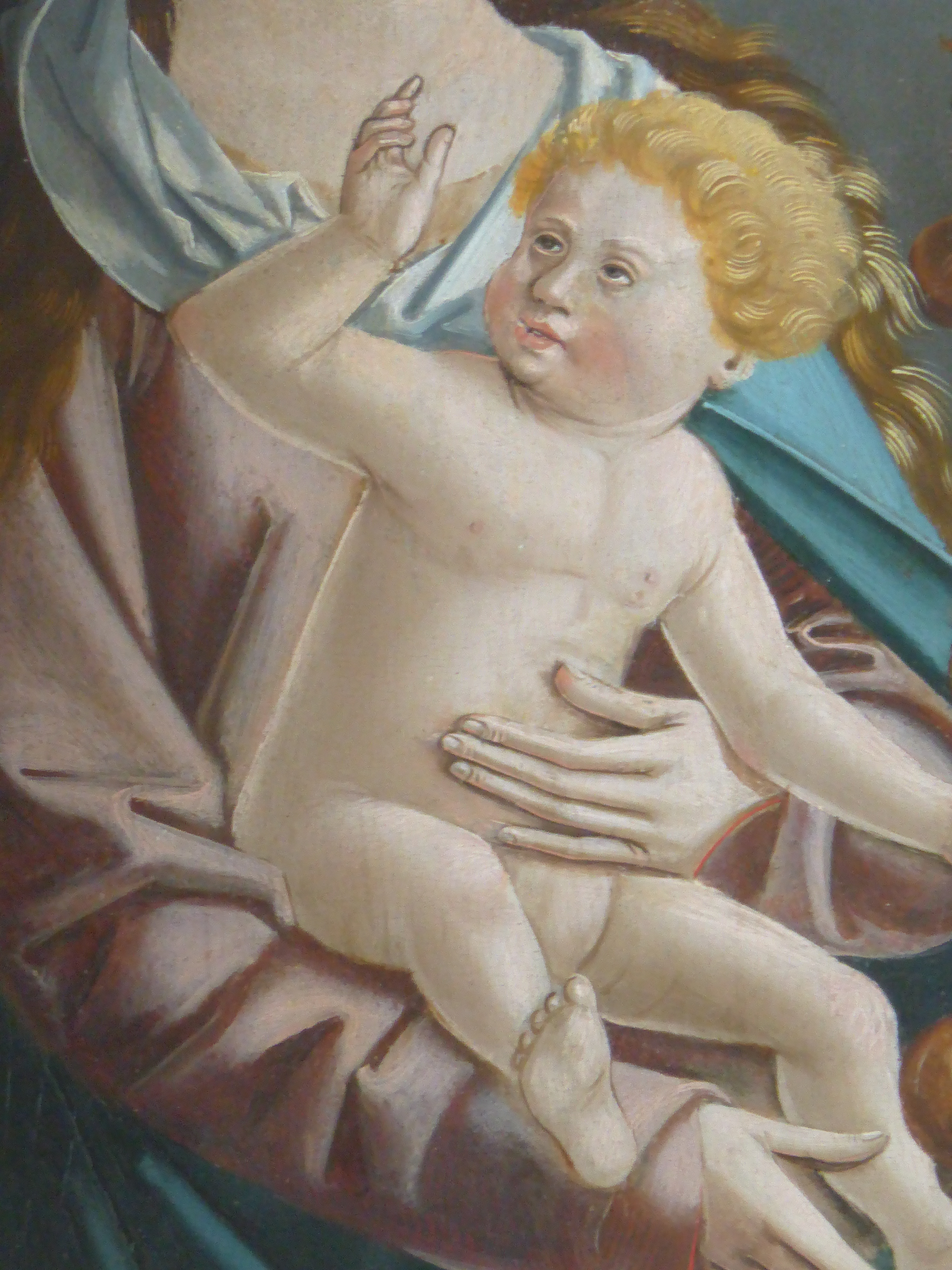 Joseph Mohrs Bild der Inspiration zur 4. Verszeile der 1. Strophe des Liedes Stille Nacht, heilige Nacht: „Holder Knab’ im lockigten Haar“, Hochaltar Mariapfarr, um 1500